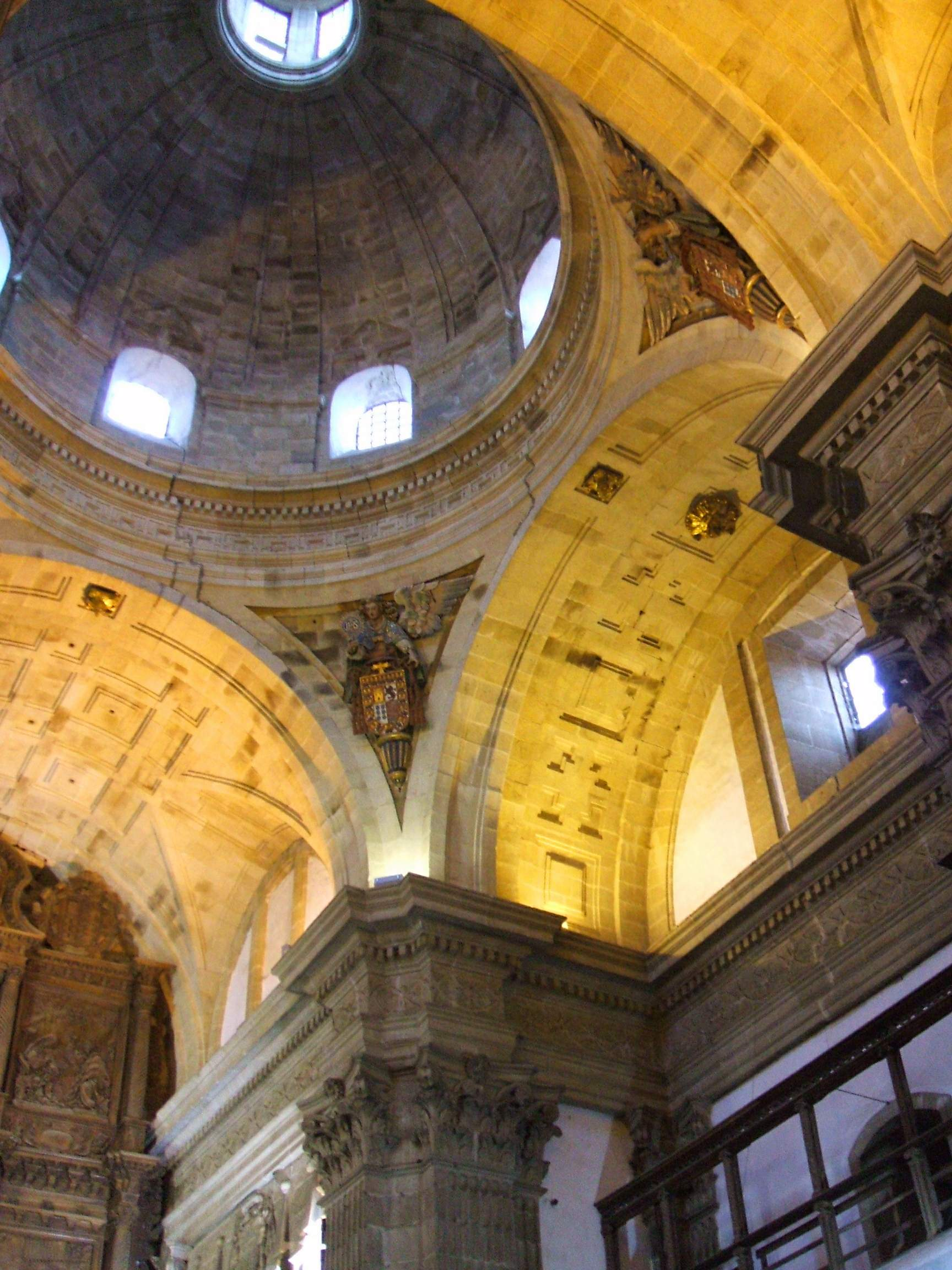 Monforte de Lemos - Iglesia del Colegio de Nuestra Señora de la Antigua (PP Escolapios)